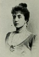 Imagen que acompaña la segunda edición del libro "Lágrimas" de la escritora uruguaya Ernestina Méndez Reissig.